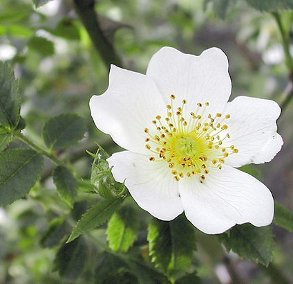 rosa arvensis